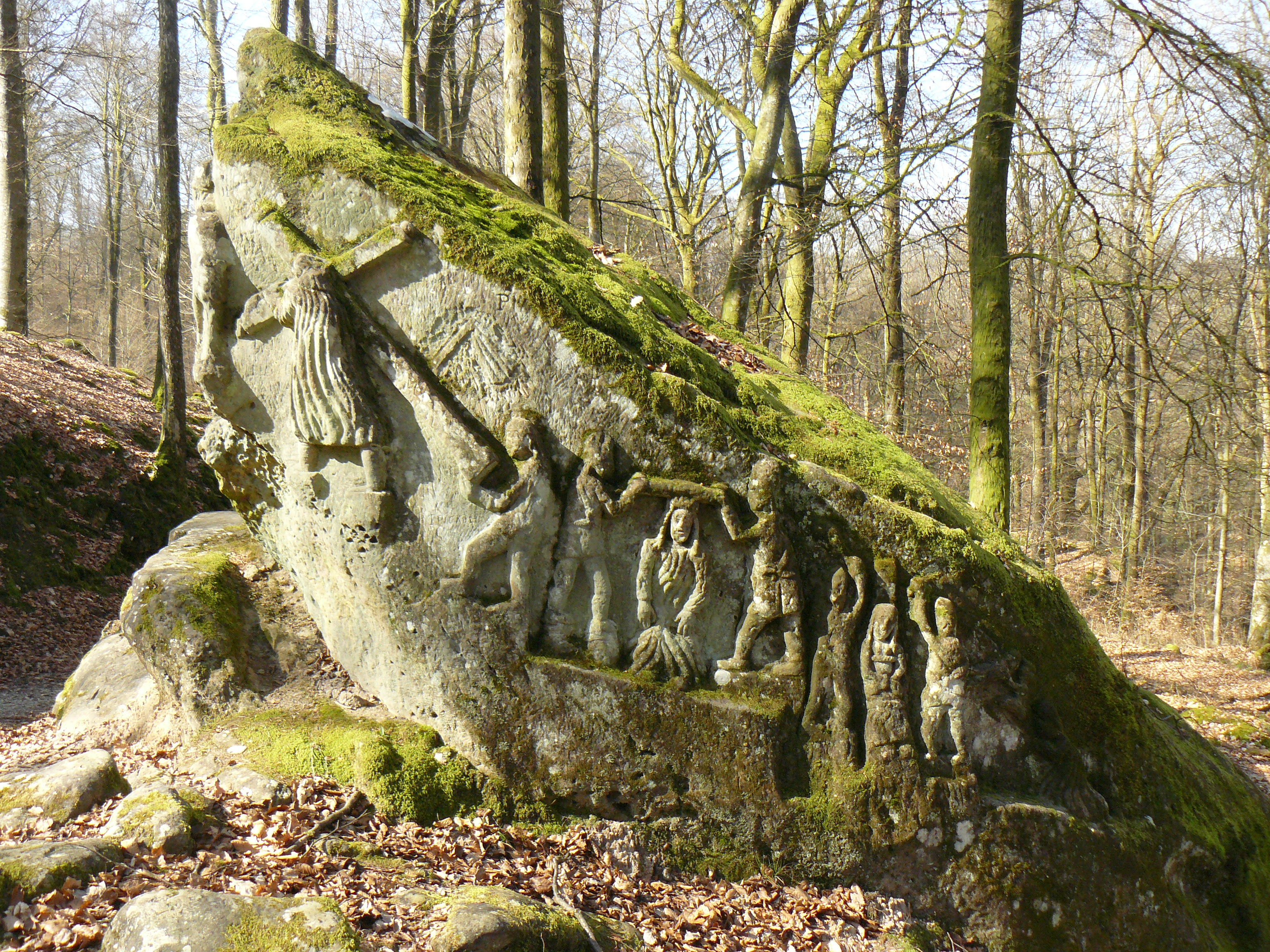 La Belle Roche, ou Roche des 12 Apôtres, à Relanges (Vosges, France)